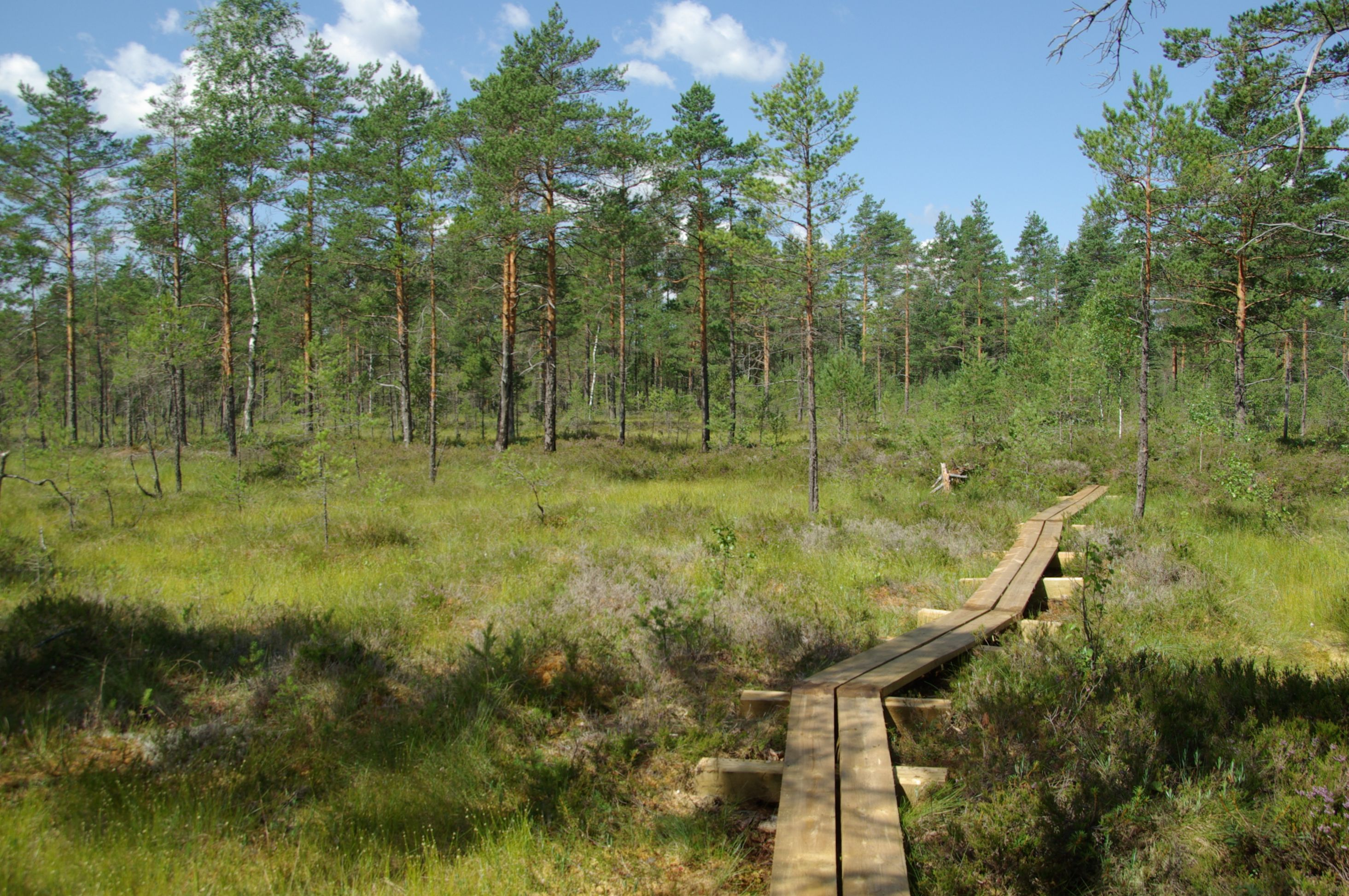 Aegviidu vallas Harjumaal, Aegviidu looduskeskuse vahetus läheduses